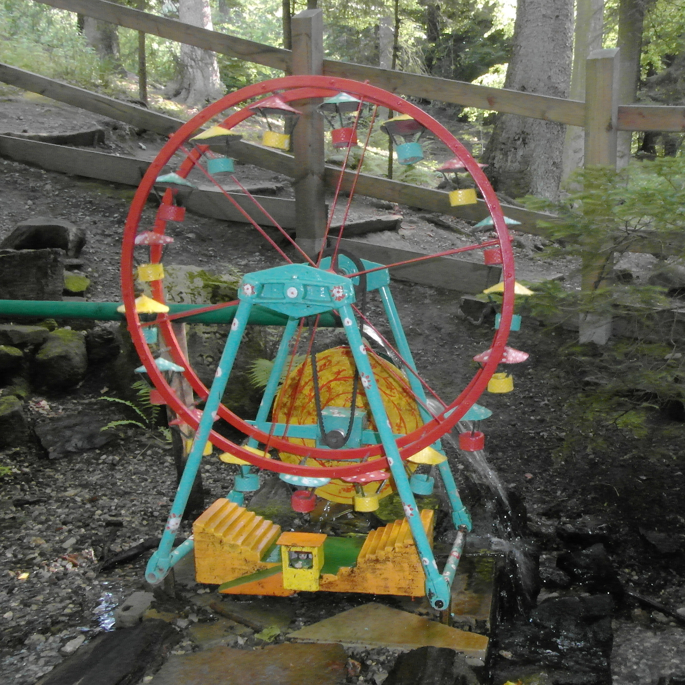 Die Modelle der Wennigser Wasserräder werden jährlich in oft überarbeitetem Design aufgebaut.